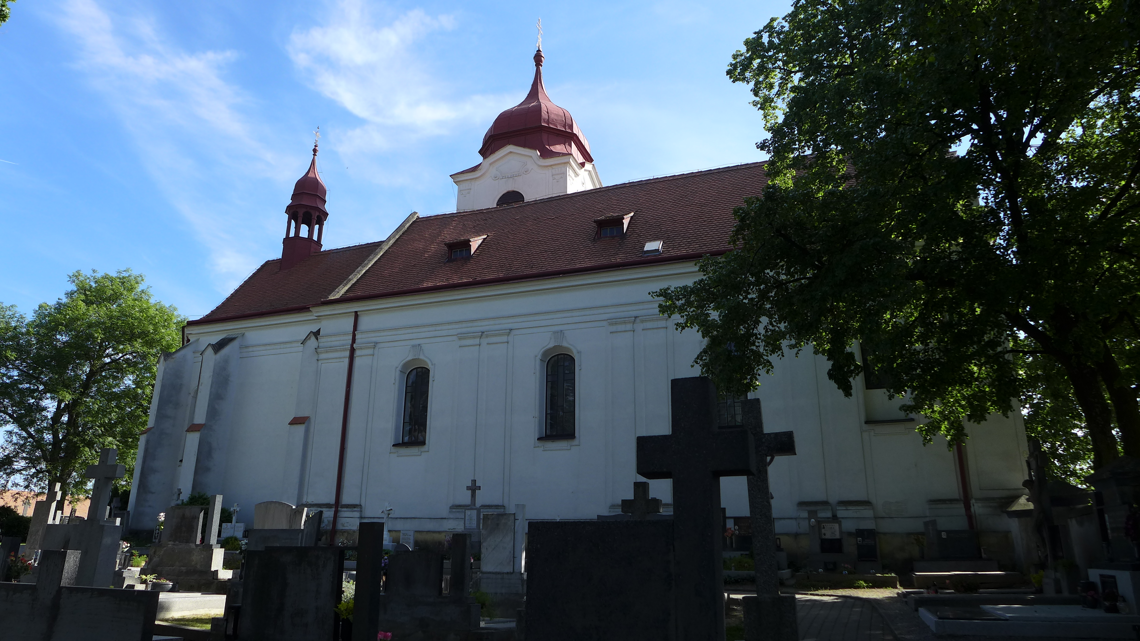 Kostel Povýšení svatého Kříže, okraj obce, Trstěnice (okres Znojmo).